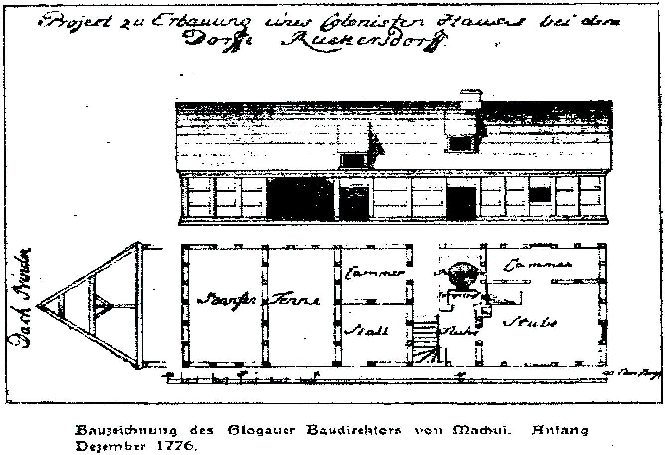 Ein Bauplan von 1776, Baumustervorgabe für Sprottauer Kolonistenhäuser